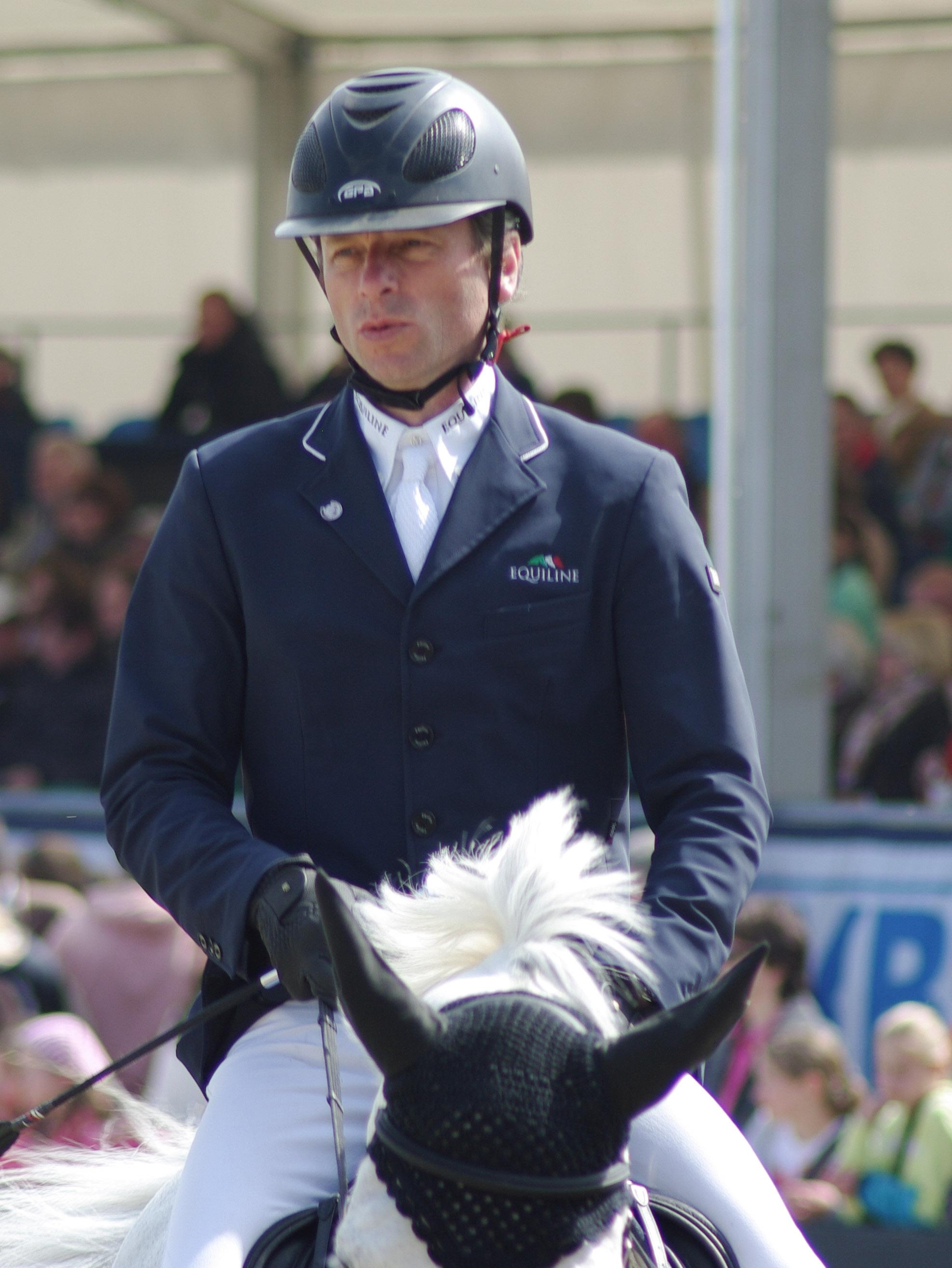 Horses & Dreams 2013: Carsten-Otto Nagel mit Corradina 2